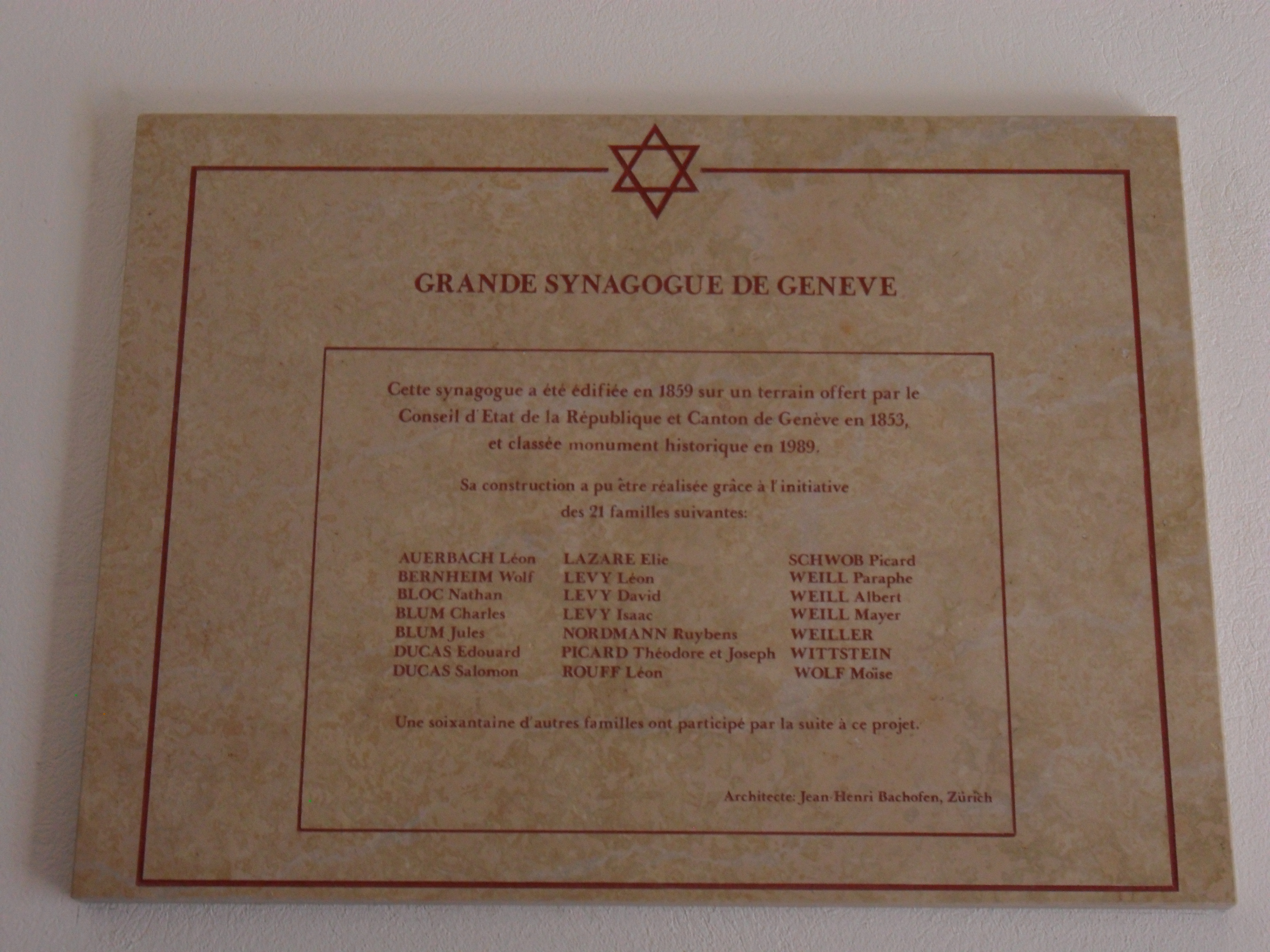 Plaque dans le vestibule de la synagogue Beth Yaacov dédiée aux familles ayant aidé à la construction du bâtiment